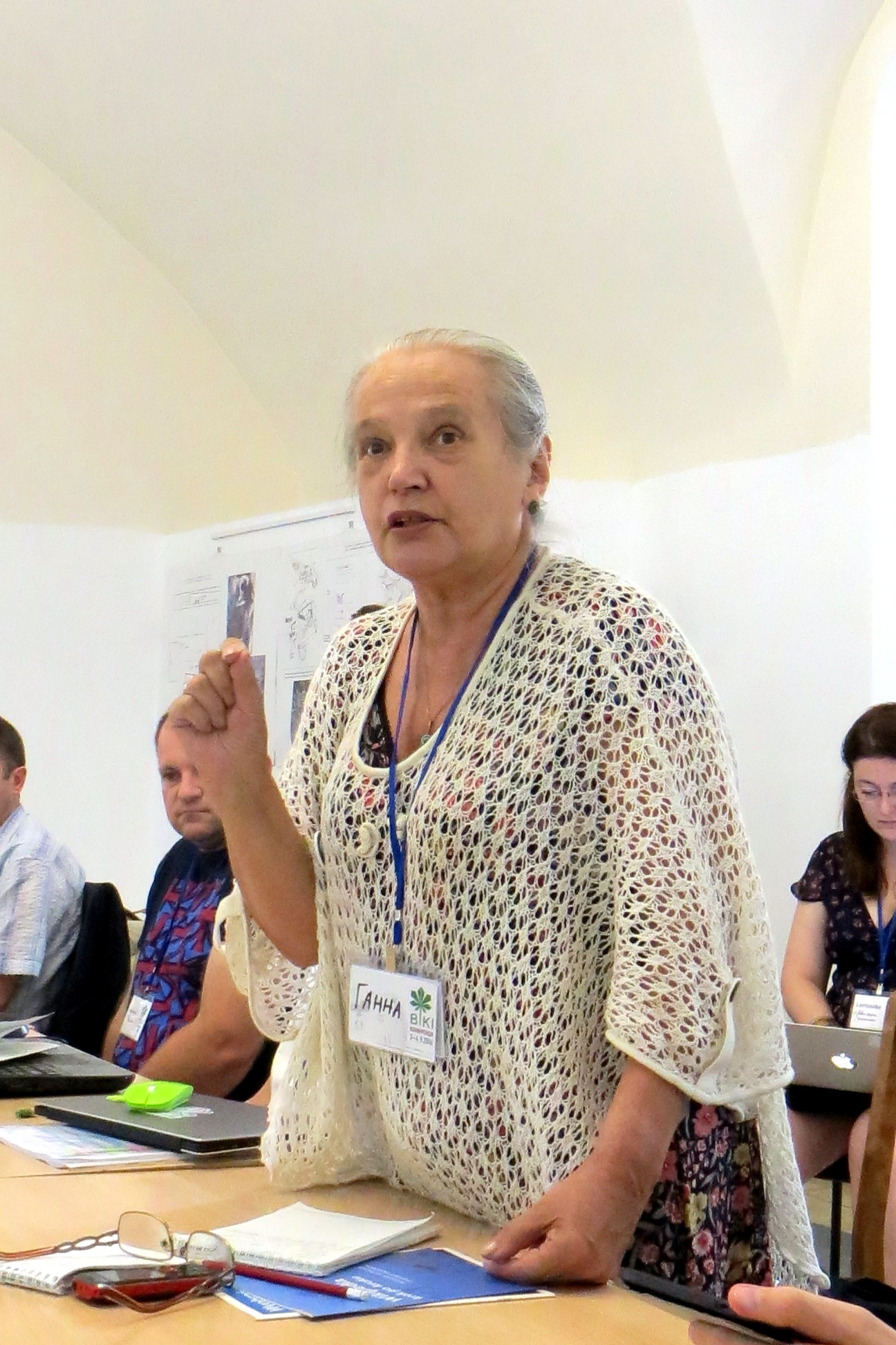 ВікіКонференція (Київ, 2016)